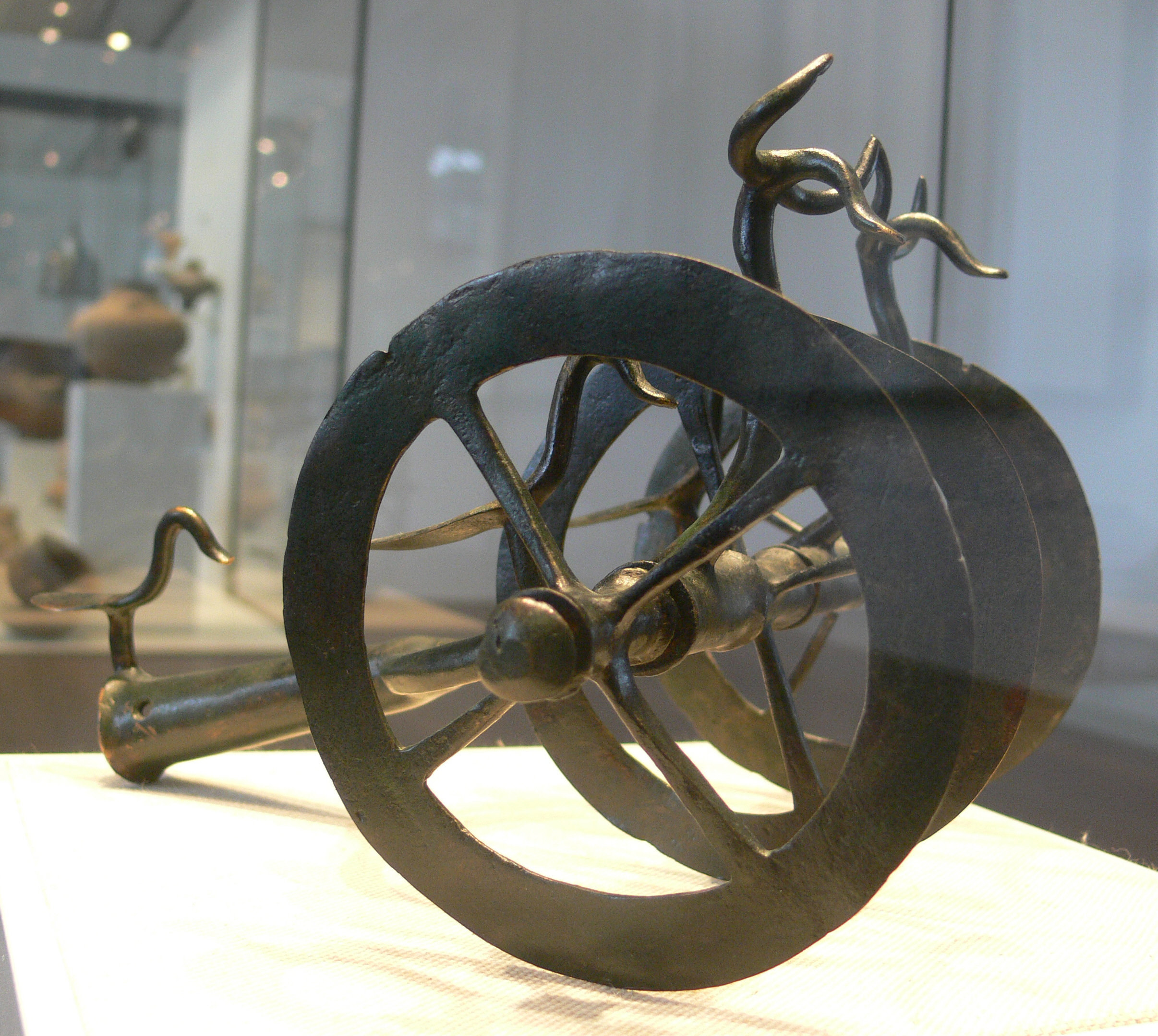 Der Kultwagen von Burg (Miniaturmodell eines Wagens), Brandenburg; 9.–11. Jh. v. Chr. Collection: Museum für Vor- und Frühgeschichte Berlin